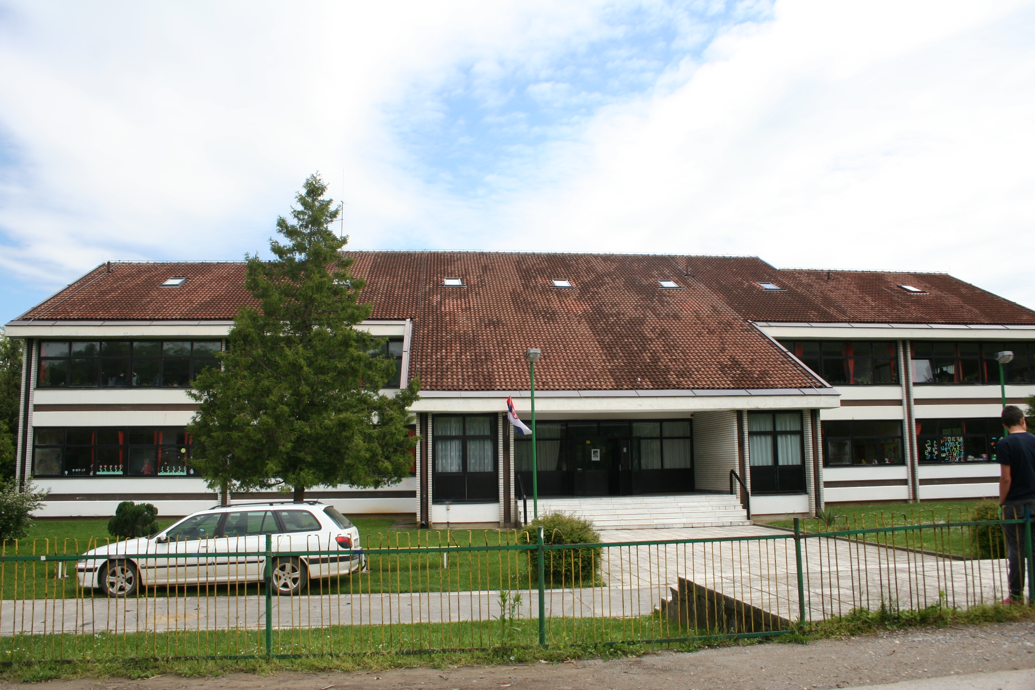 Nova škola, Bela Crkva opština Krupanj